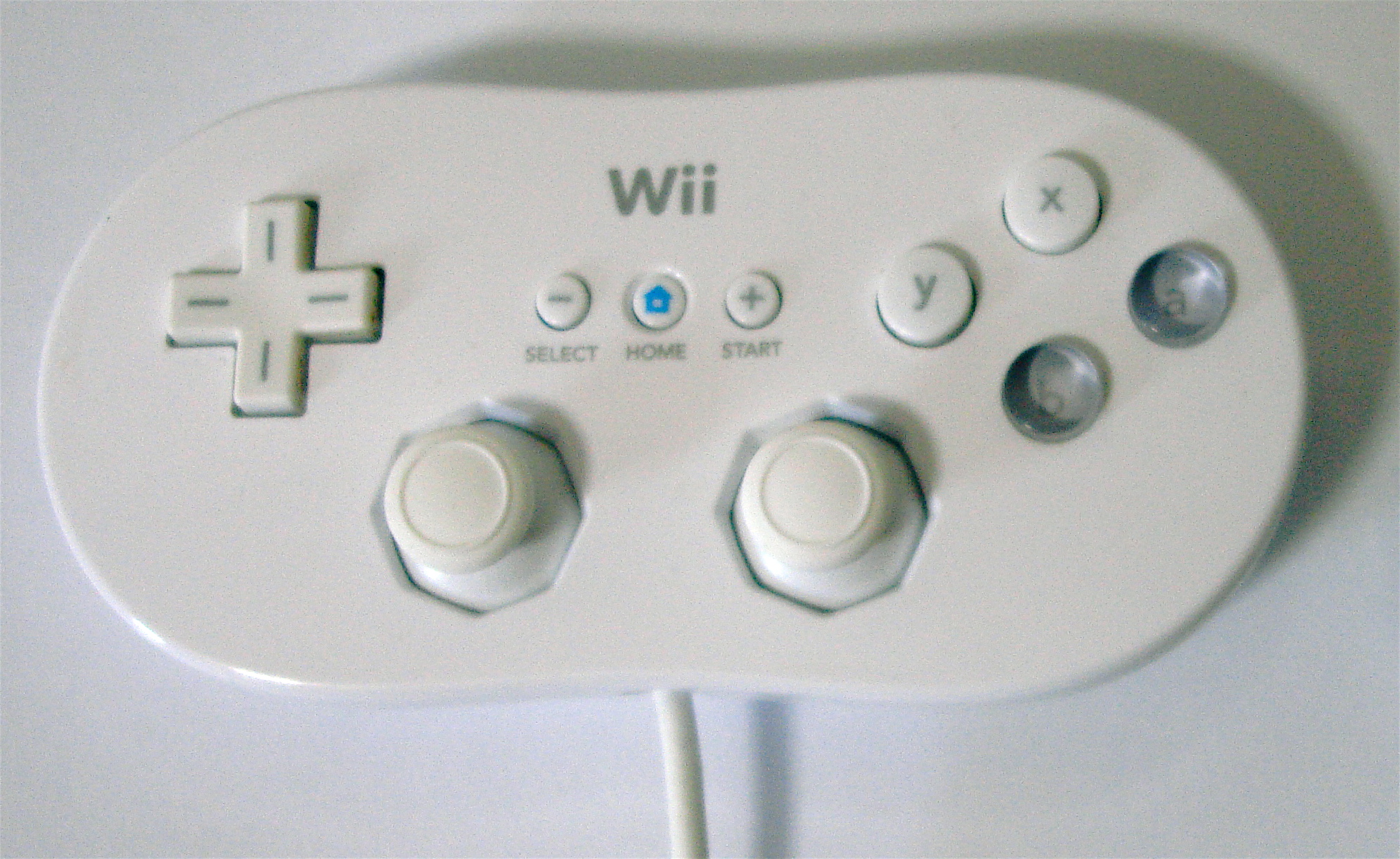 Wii Classic Controller